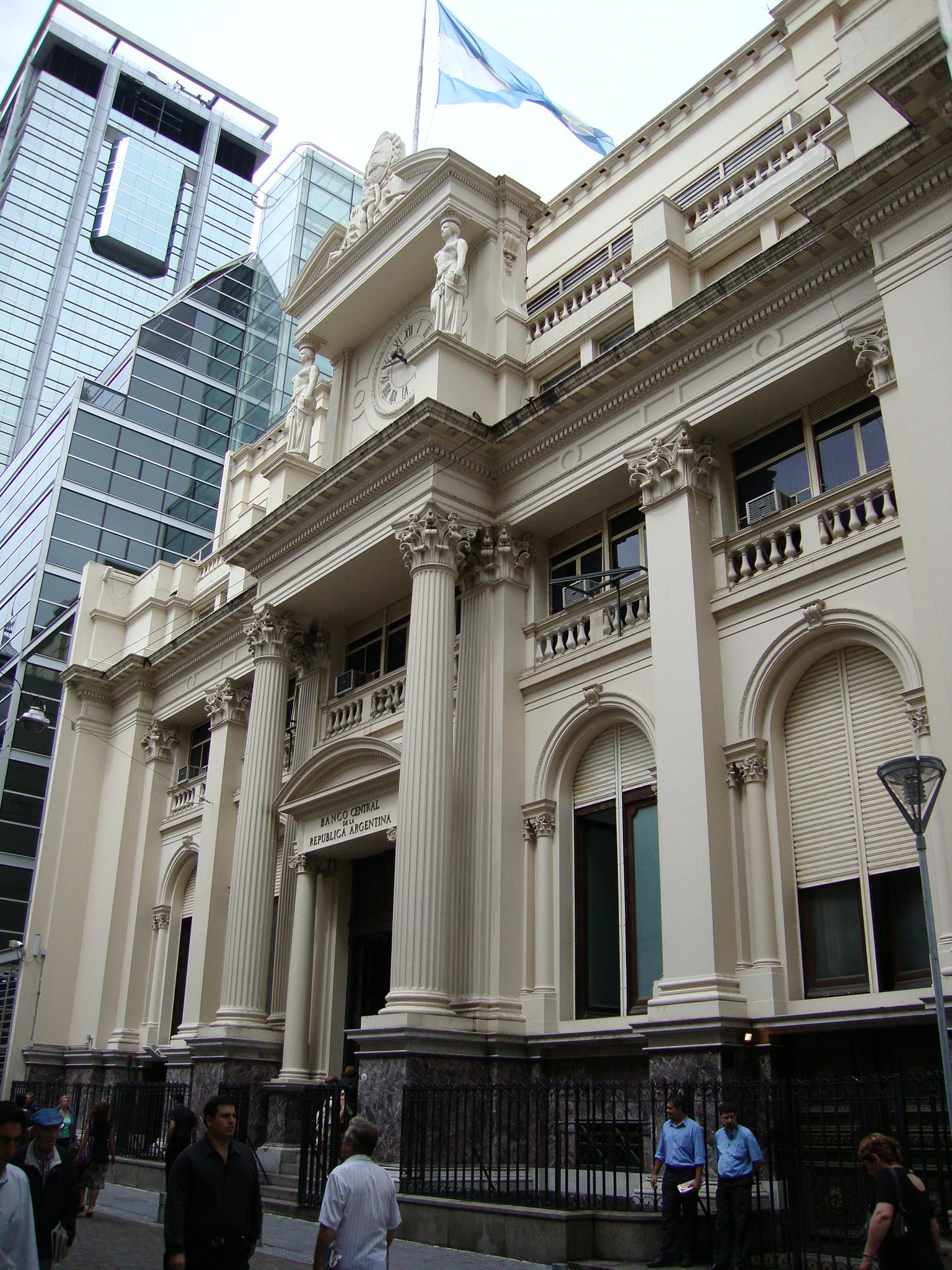 Edificio construido para el Banco Central de la República Argentina en 1940, en la calle Reconquista. Es gemelo al que tiene su frente por la calle San Martín, del año 1876.